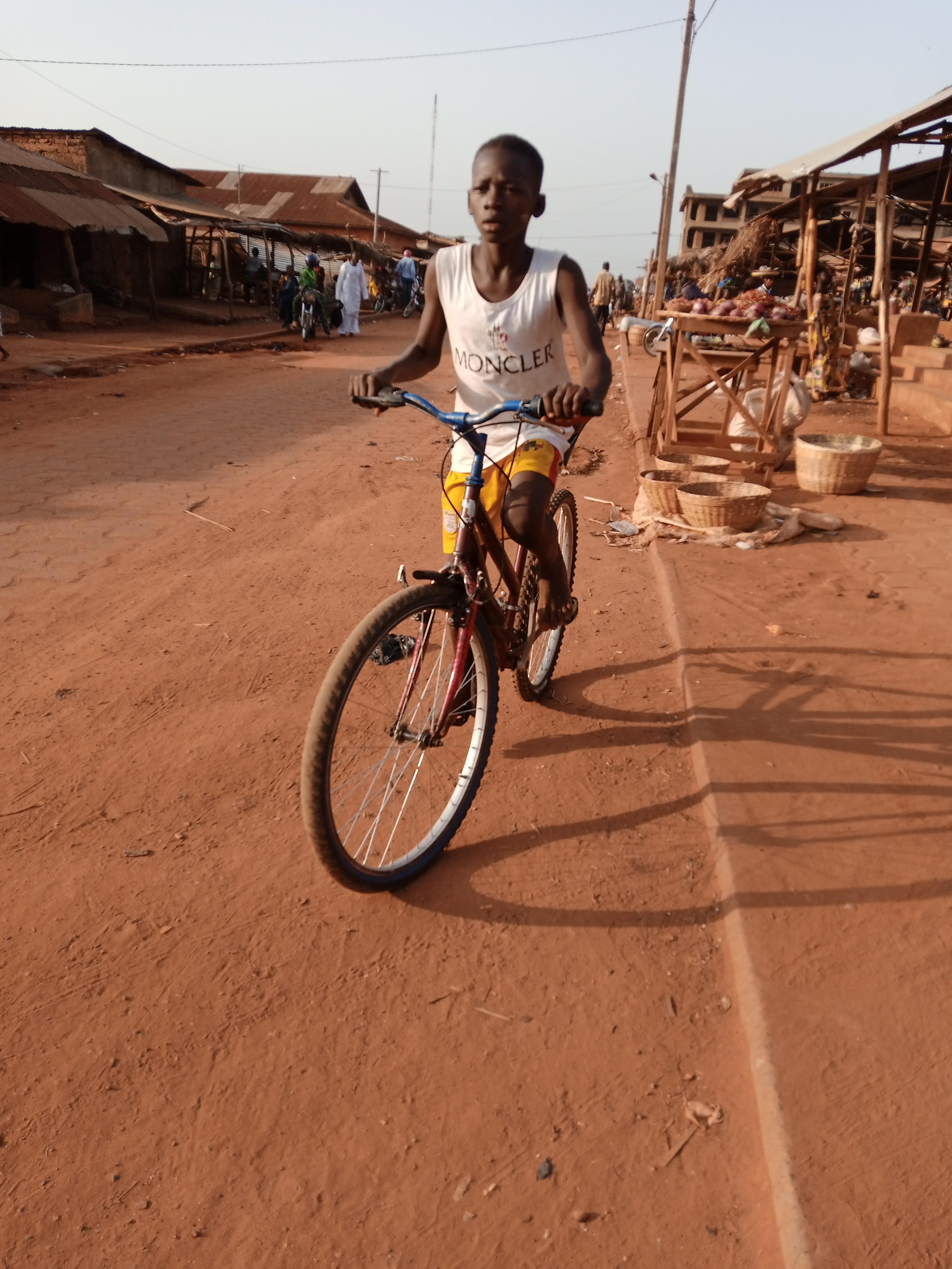 enfant conduisant son vélo au marché de Pobé This is an image with the theme "Africa on the Move or Transport" from: Benin